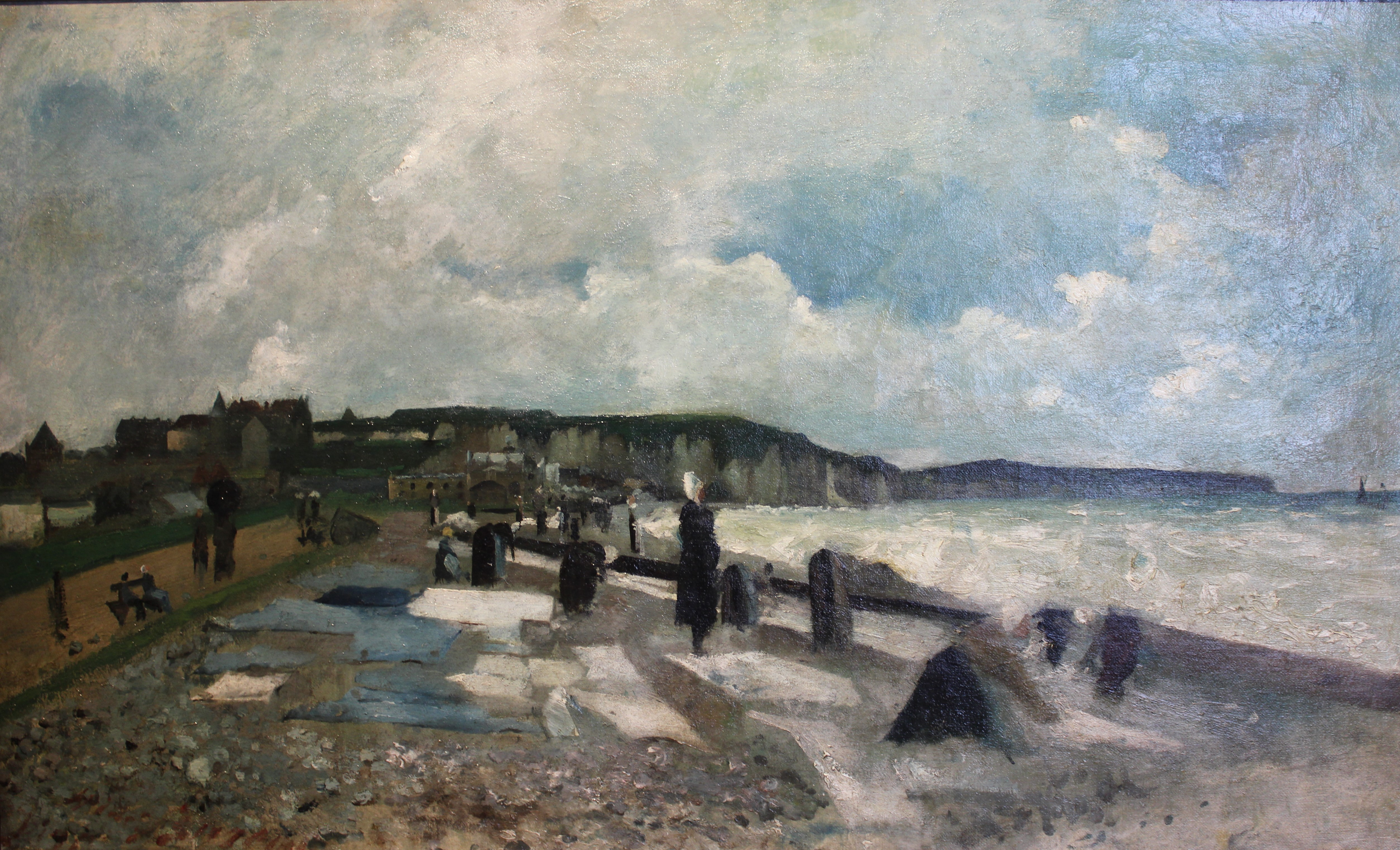 Pierre Isidore Bureau, Plage de Dieppe (#100wikicommonsdays day 62)